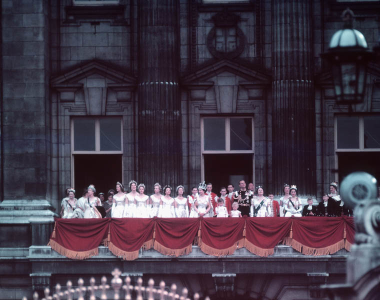 Title / Titre : Coronation of Queen Elizabeth II / Couronnement de la Reine Elizabeth II Creator(s) / Créateur(s) : Unknown / Inconnu Date(s) : June 2, 1953 / 2 juin 1953 Reference No. / Numéro de référence : MIKAN 3242152 Location / Lieu : London, England / London, Angleterre Credit / Mention de source : Library and Archives Canada, K-0000046 / Bibliothèque et Archives Canada, K-0000046